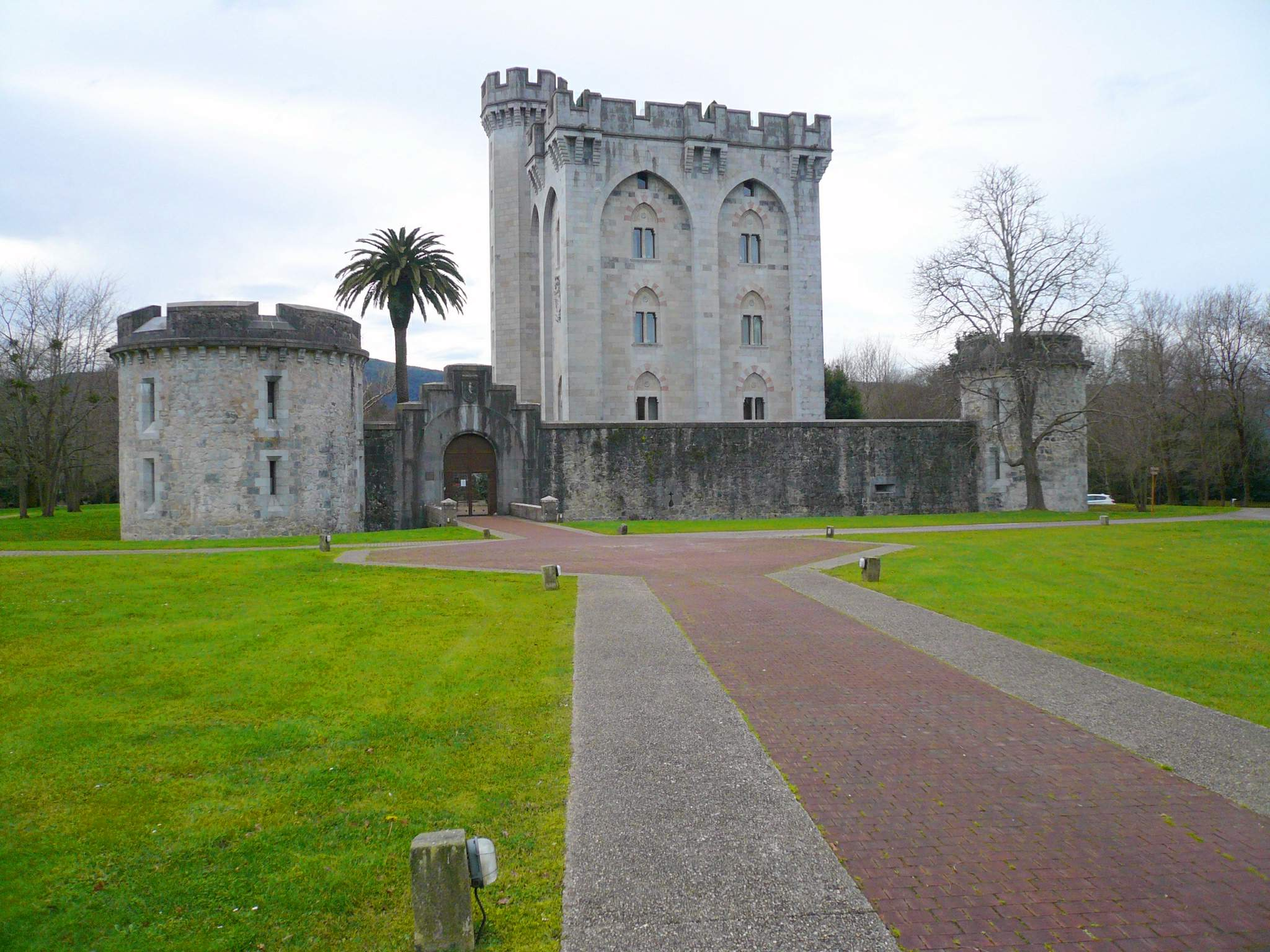 Castillo de Arteaga y entorno (Gautegiz Arteaga, Vizcaya)